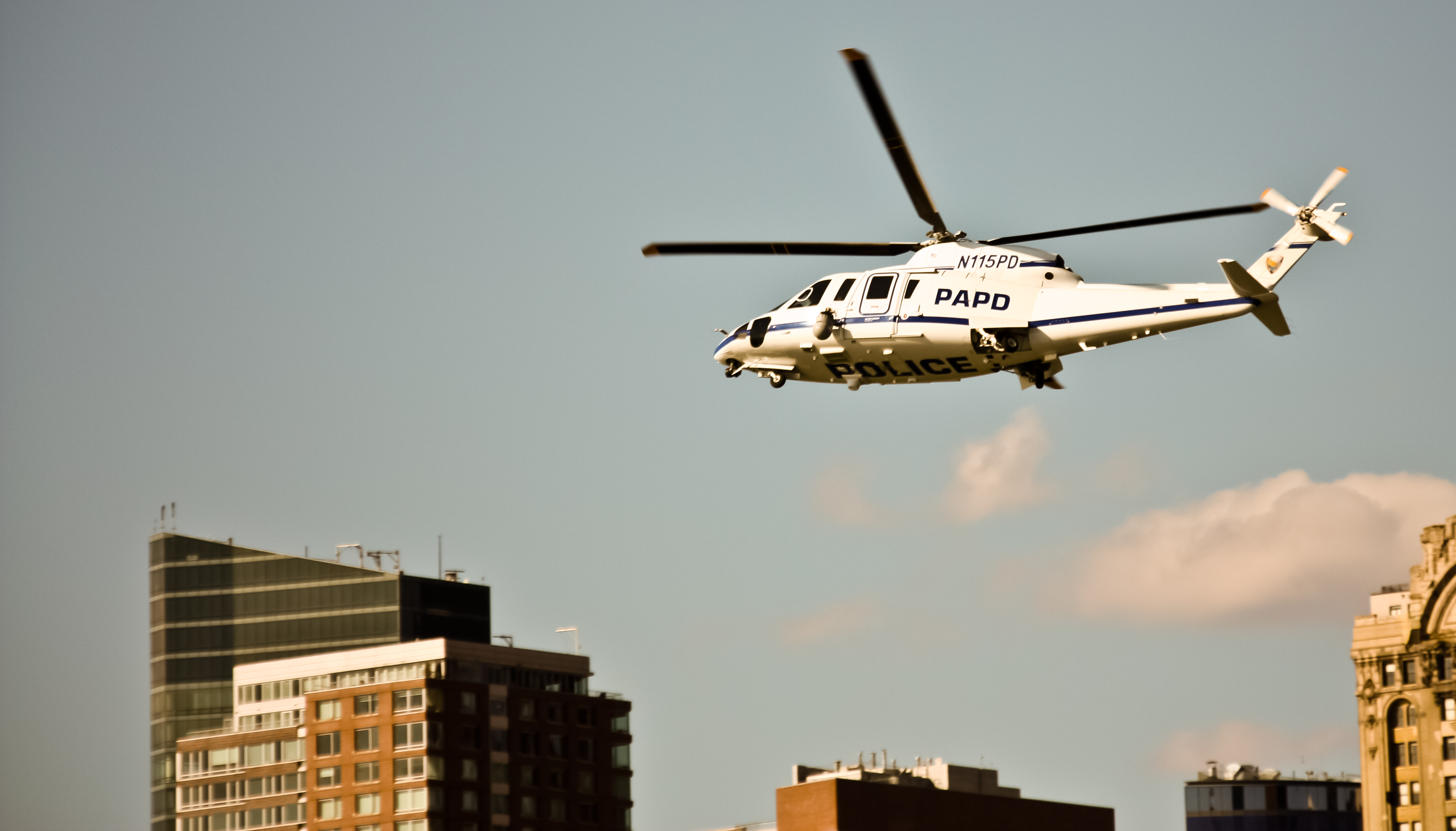 Osea, la policía del puerto de New York y New Jersey